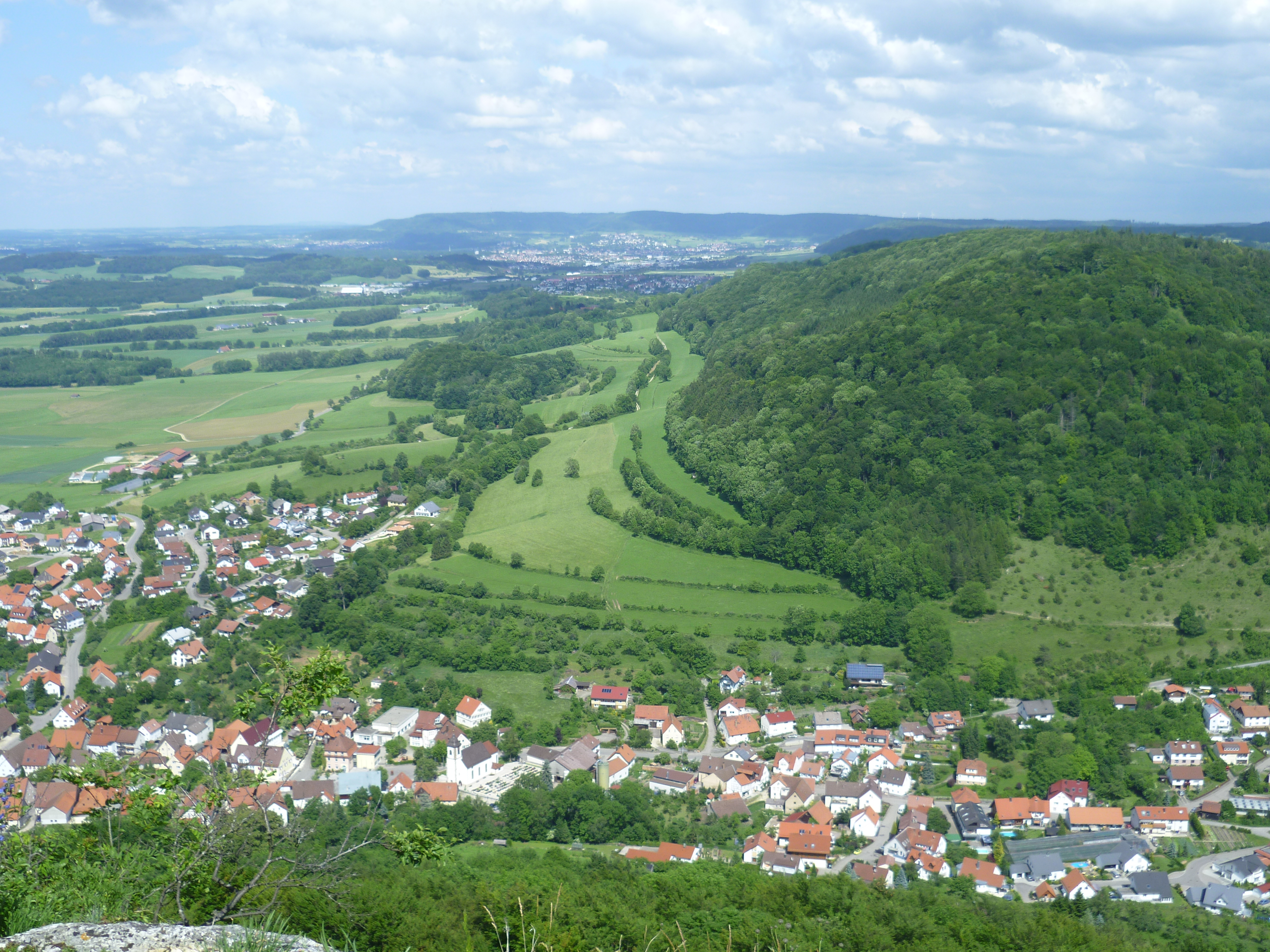 Remstal-Höhenweg: Ausblick vom Rosenstein über Lautern